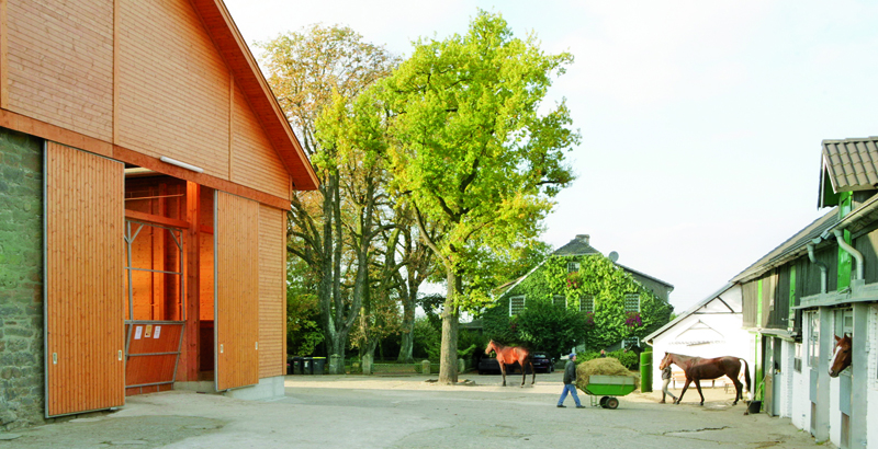 Zu sehen ist der Spelberghof in Essen, eine Einrichtung des Franz Sales Hauses, die u. a. Reittherapie für Menschen mit Behinderung anbietet.